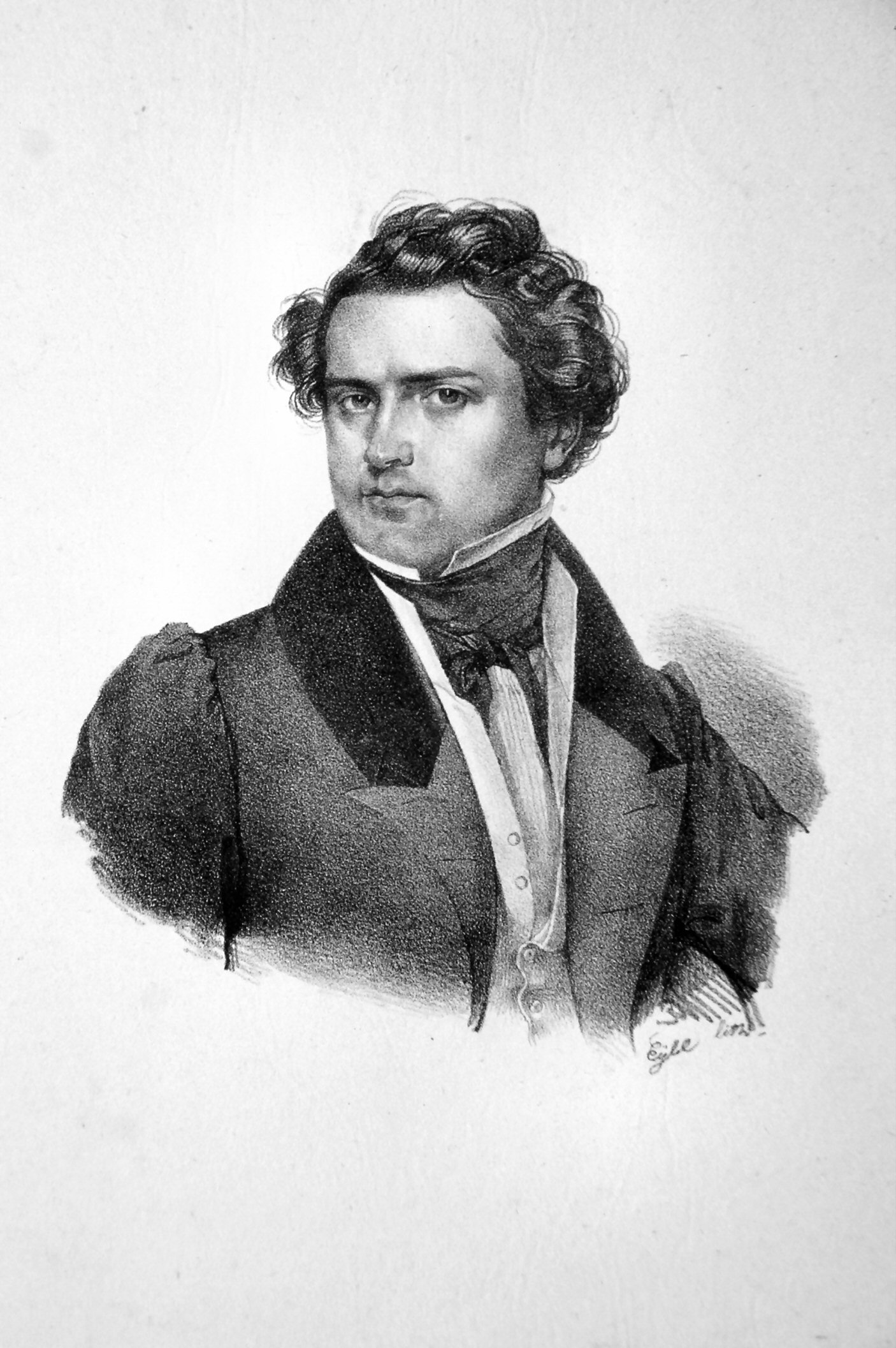 August Fischer (1798-1865), Operndänger (Bass). Lithographie von Franz Eybl, um 1830